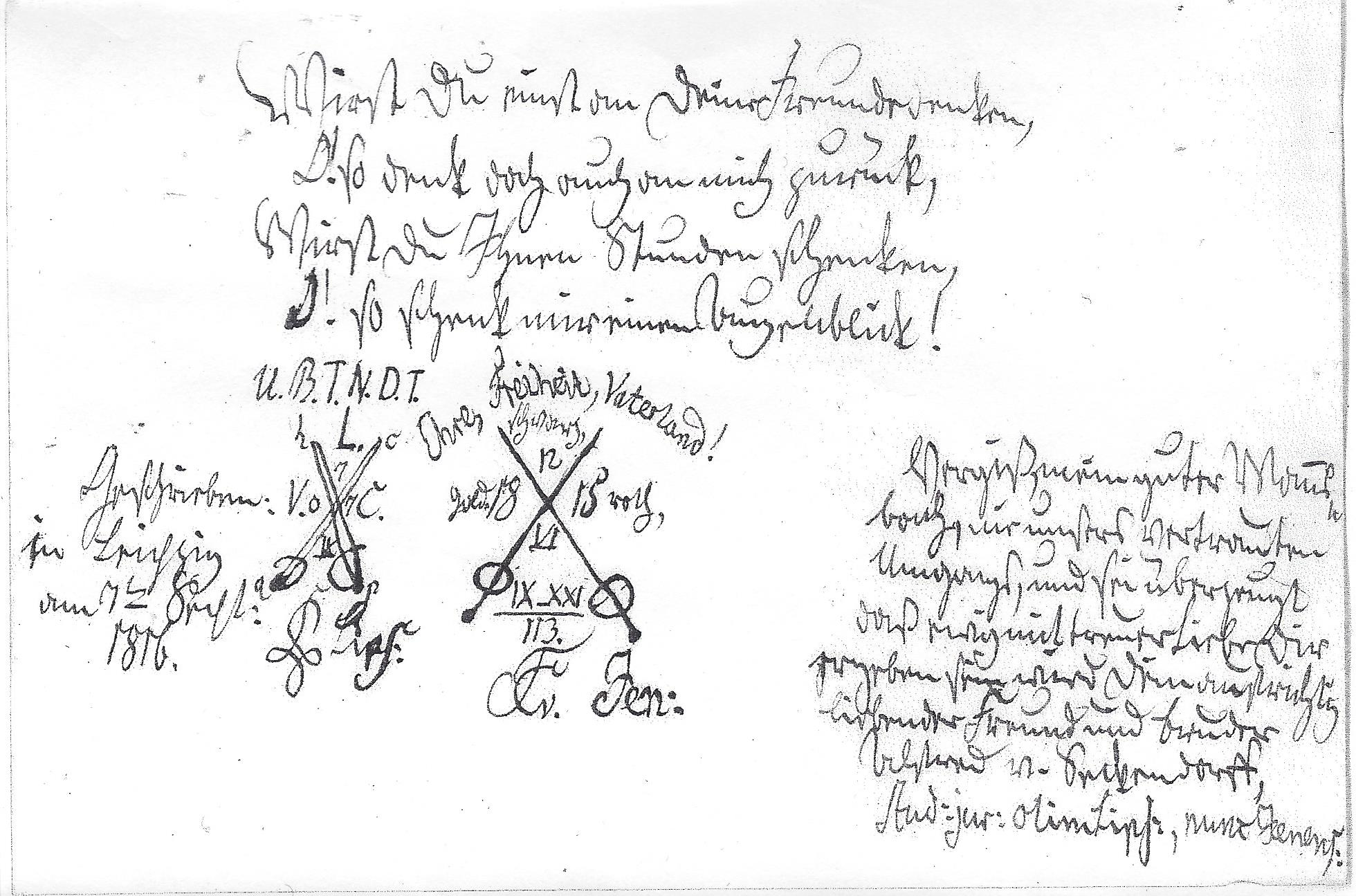 Stammbuchblatt von Alfred von Seckendorff im Stammbuch von Ludwig Freiherrn von und zu Massenbach. Bundeszeichen U.B.T.N.D.T. – gekreuzte Glockenschläger – L.V.C. – 7 IX 07 – Zirkel Lus. Lips. (Corps Lusatia Leipzig) Ehre, Freiheit, Vaterland! – gekreuzte Stoßdegen – schwarz-gold-roth – 12 VI 1815 – Zirkel Urb. Jen. (Urburschenschaft Jena) Widmungen Wirst Du einst an Deine Freunde denken, / D! So denk doch auch an mich zurück. / Wirst Du ihnen Stunden schenken, / D! So schenk mir einen Augenblick! Vergiß, mein guter Mannsbach, / nie unsres vertrauten Umgangs, / und sei überzeugt, daß ewig mit / treuer Liebe Dir ergeben sein wird / Dein aufrichtig liebender Freund / und Bruder Alfred v. Seckendorff, / Stud. jur. olim Lips., nunc Jenens.